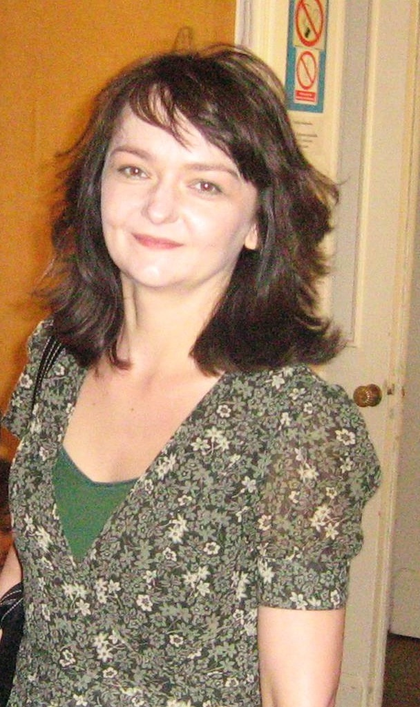 Izabela Dąbrowska (ur. 1966) – polska aktorka filmowa i dubbingowa.